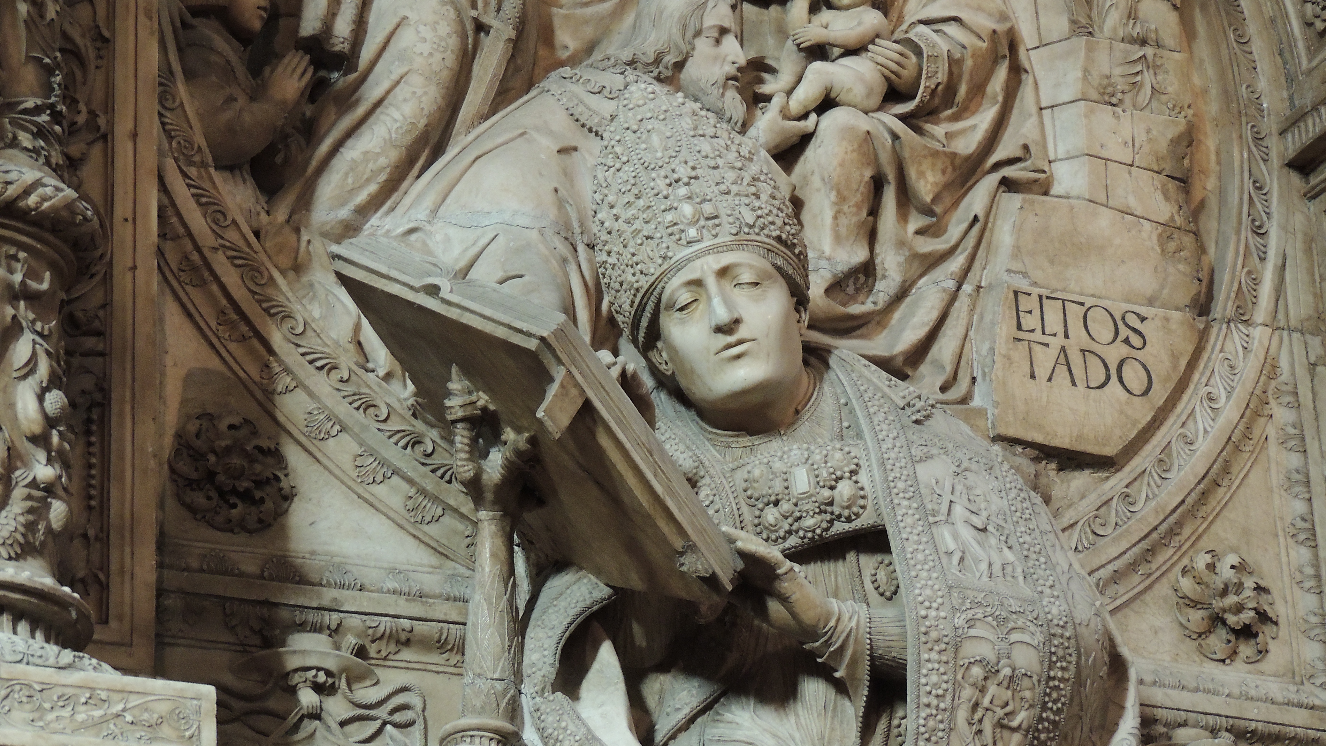 Sepulcro del prelado espáñol Alonso Fernández de Madrigal (1410-1455), Obispo de Ávila y conocido como el Tostado. Se encuentra en la catedral de Ávila, (España).